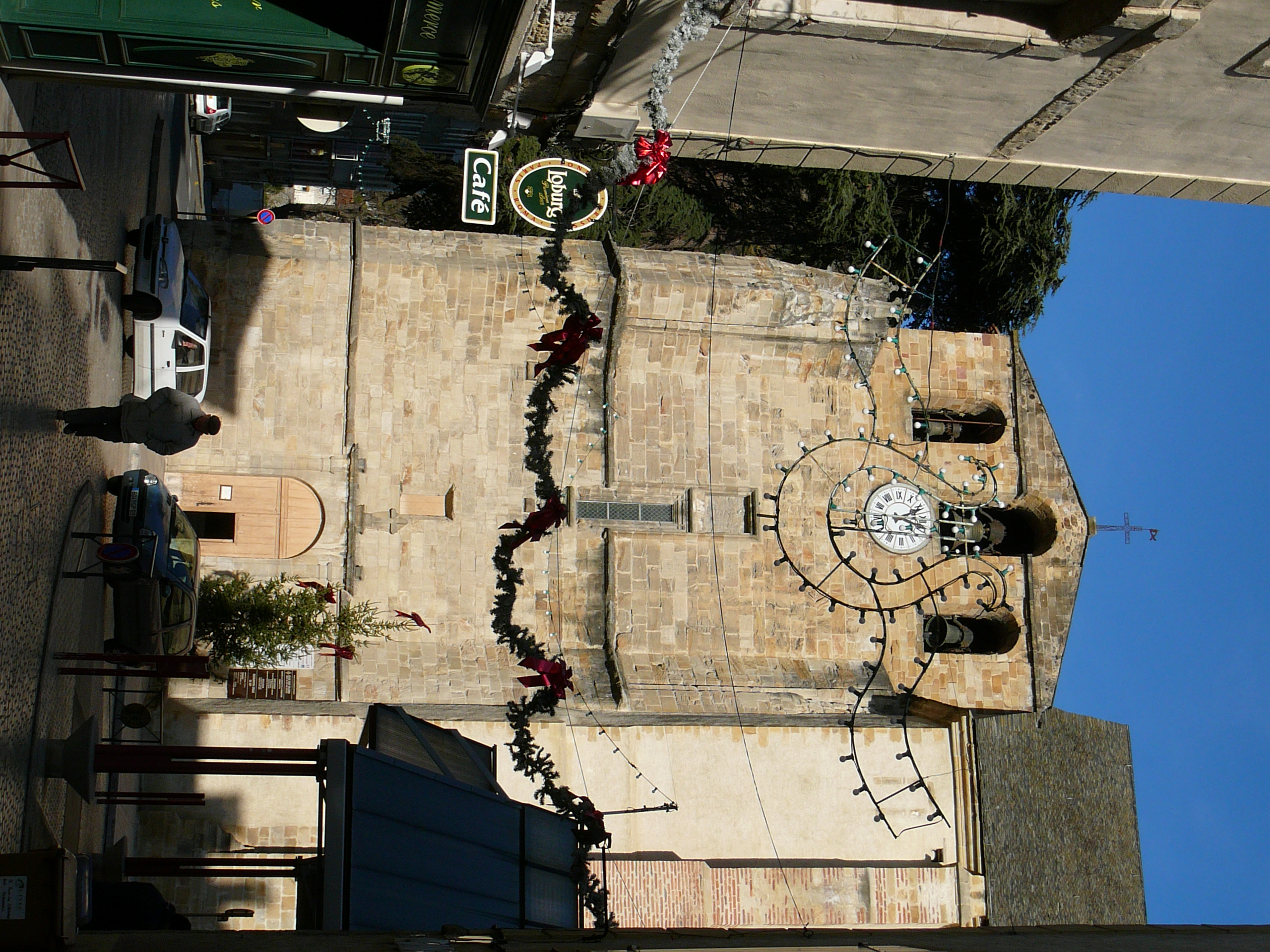 Eglise Saint Volusien - Foix (Ariège) .